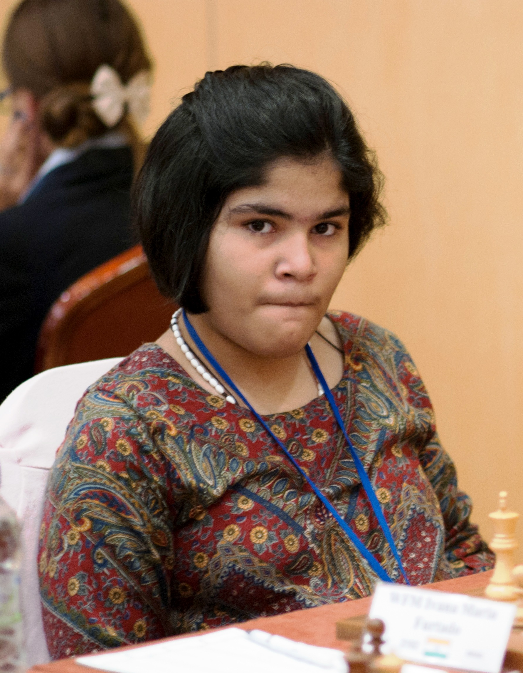 WFM Ivana Maria Furtado, WChJ Athens 2012